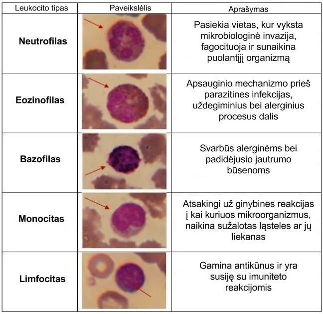 Baltųjų kraujo kūnelių svarba - funkcijos